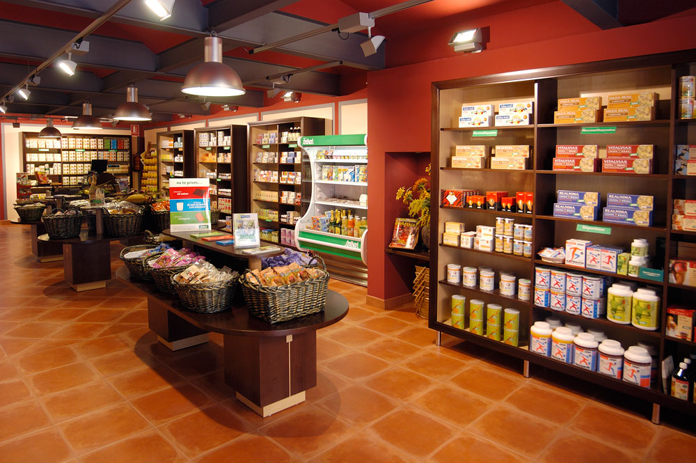 Debido a que en sus orígenes Santiveri tenía una gran mayoría de clientes vegetarianos, desarrolló productos propios prácticos muy innovadores.